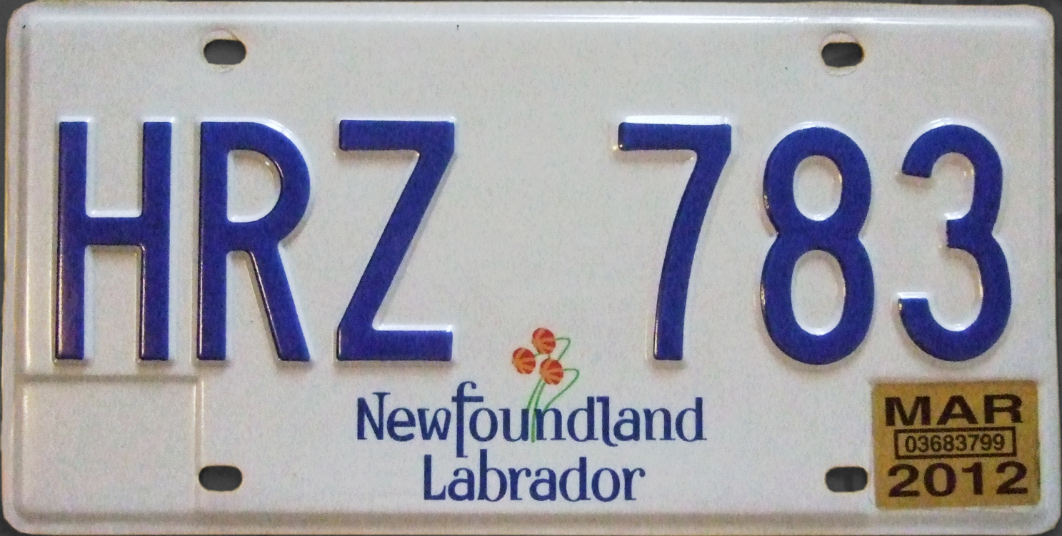 NEWFOUNDLAND 2012 LICENSE PLATE